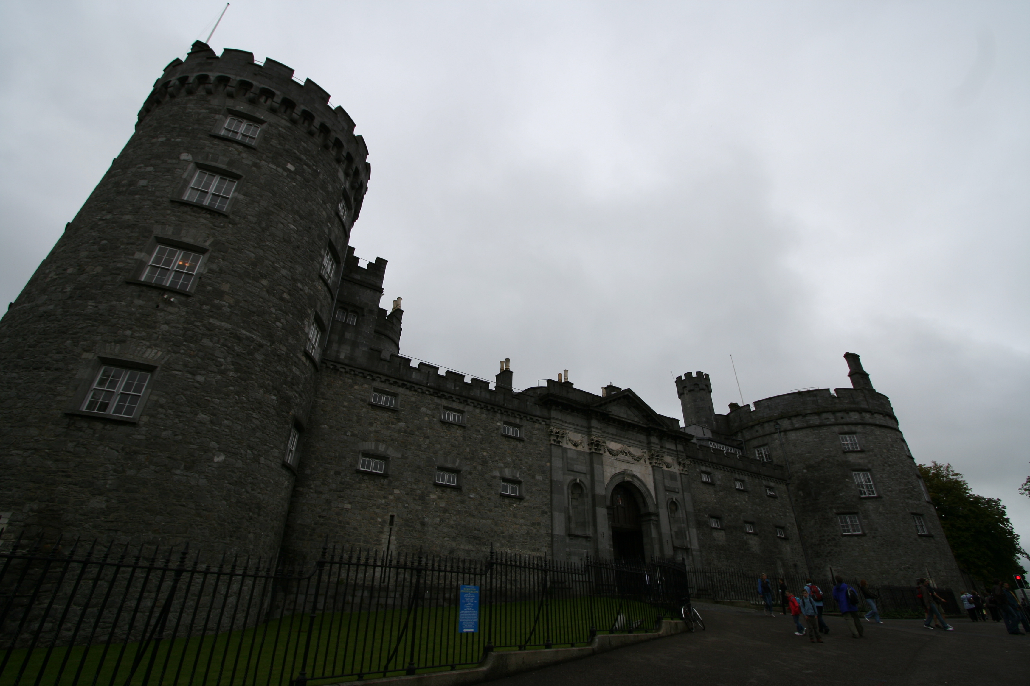 Castillo de Kilkenny, Kilkenny en el condado homónimo. Irlanda